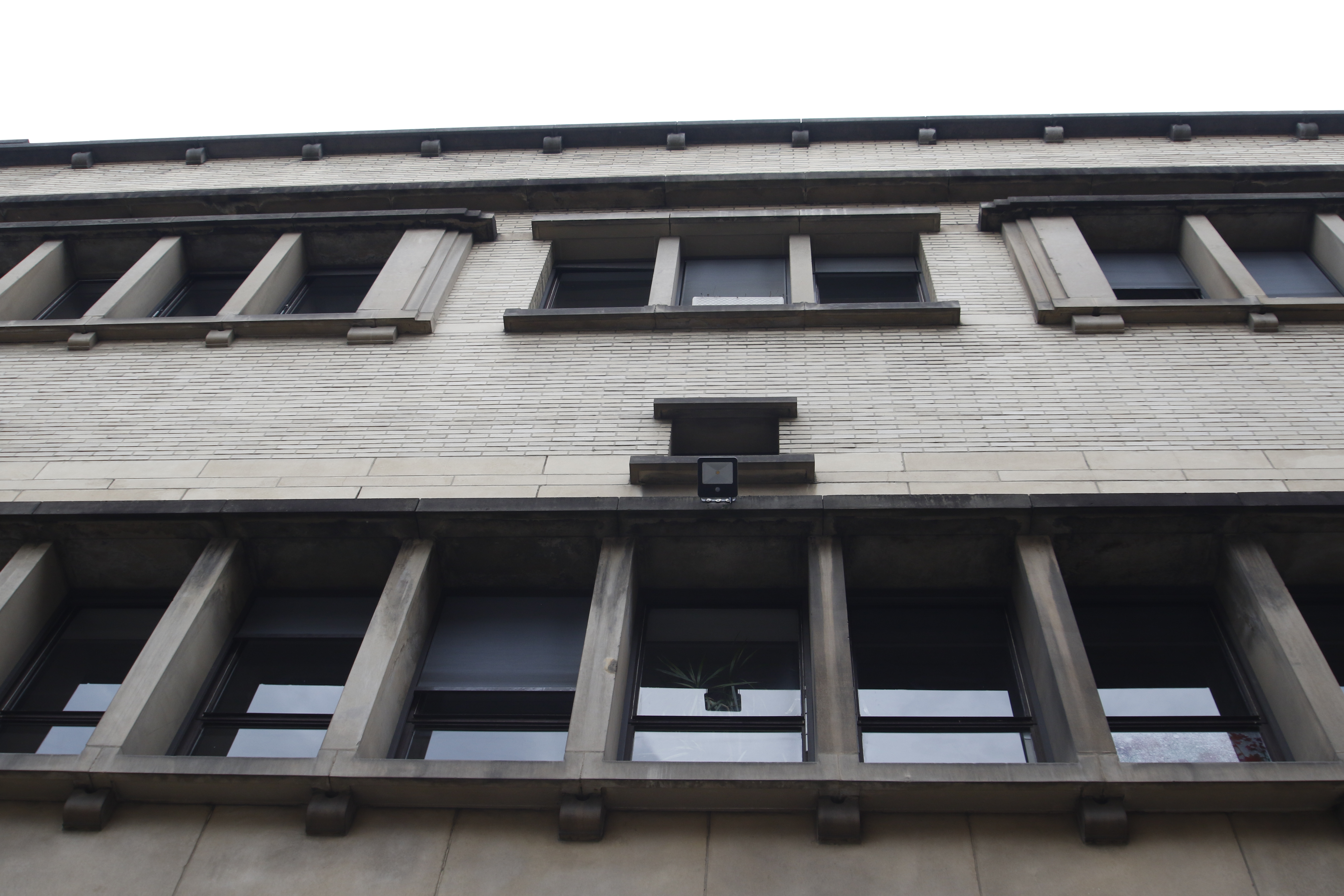 Vue sur les corniches et les corbeaux